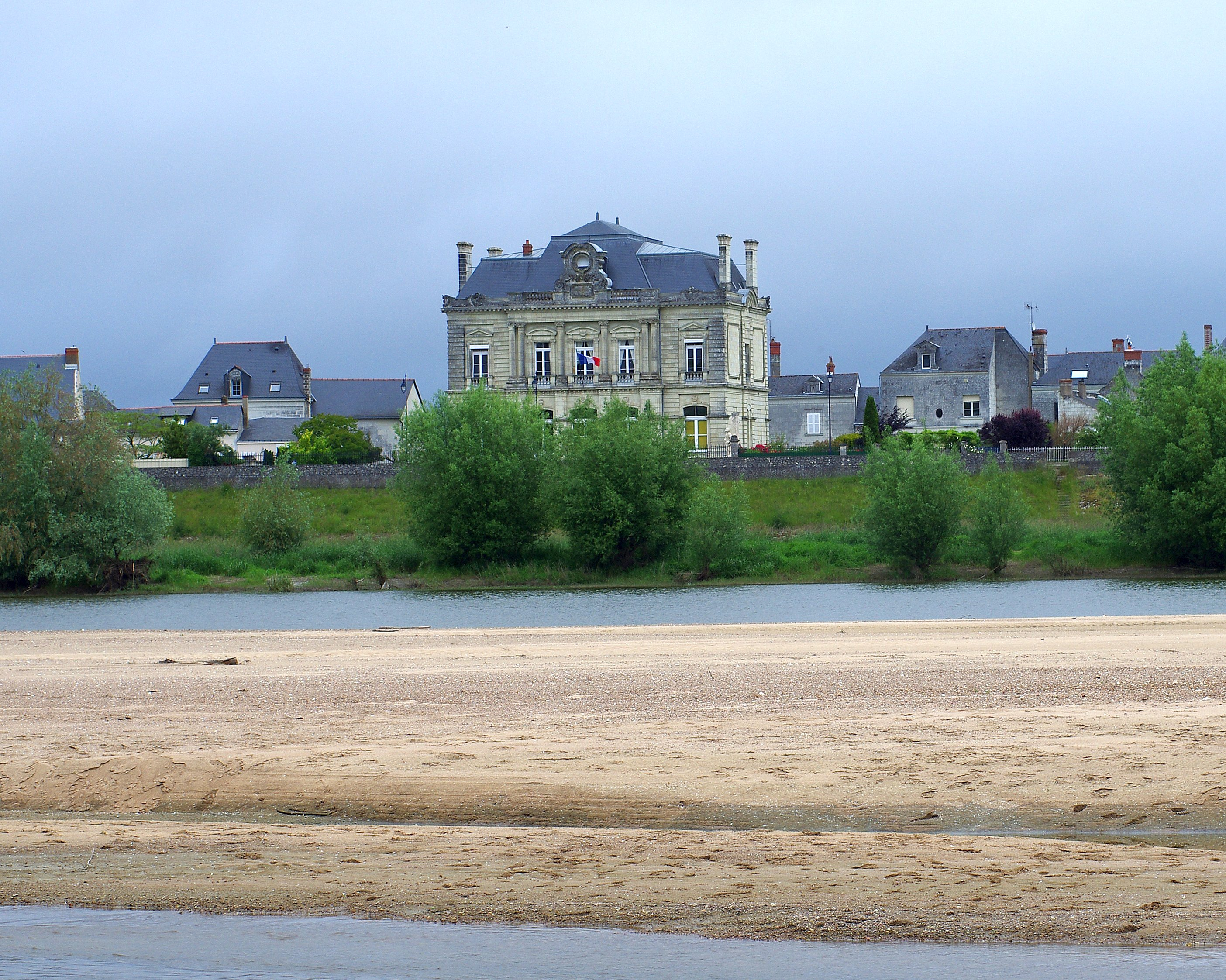 Les Rosiers-sur-Loire (Maine-et-Loire) - la mairie du 19e siècle (1876).